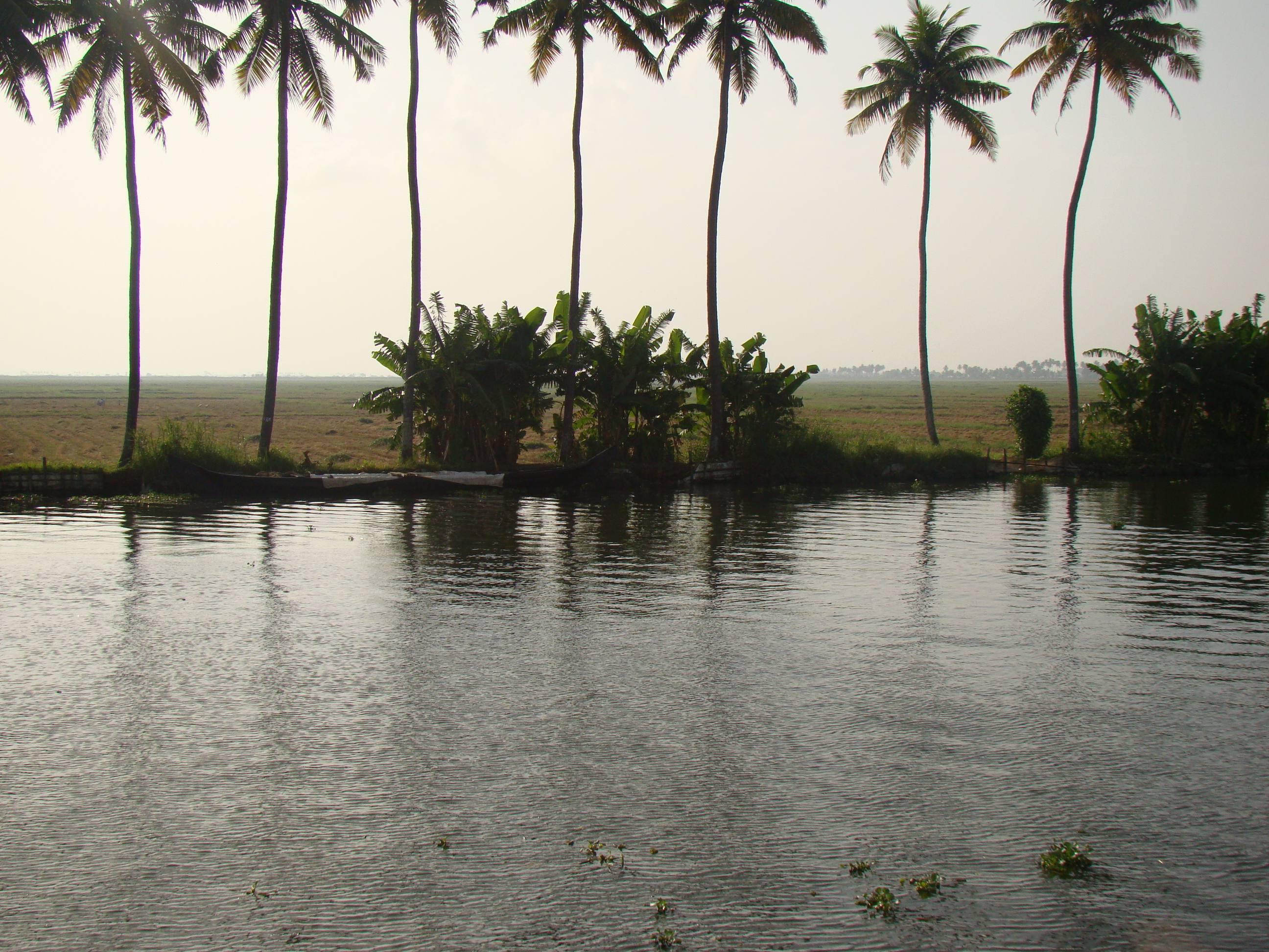 വേമ്പനാട്ട് കായല്‍ നികത്തെയെടുത്ത നിലങ്ങളില്‍ നടക്കുന്ന കൃഷി. സമുദ്രനിരപ്പിനും താഴെയാണ് ഇവിടെ കൃഷി നടക്കുന്നത്. വെള്ളം വലിയ യന്ത്രങ്ങളുപയോഗിച്ച് വെള്ളം വറ്റിച്ചാണ് കൃഷിനിലങ്ങള്‍ ഒരുക്കുന്നത്. ലോകത്തിലെ തന്നെ അപൂര്‍വ്വമായ ഒരു കൃഷിരീതിയാണ് വേമ്പനാട് തണ്ണീര്‍ത്തടത്തിന്റെ ഭാഗമായ കേരളത്തിലെ കുട്ടനാടന്‍ കൃഷി.